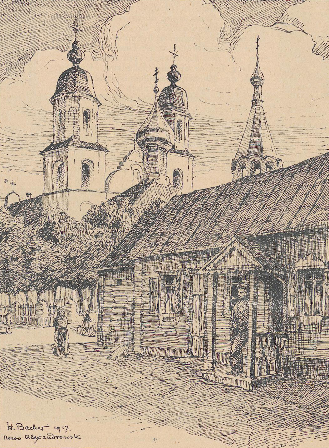 Беларуская (тарашкевіца): Езяросы (Jeziarosy), пляц Рынак (plac Rynak)